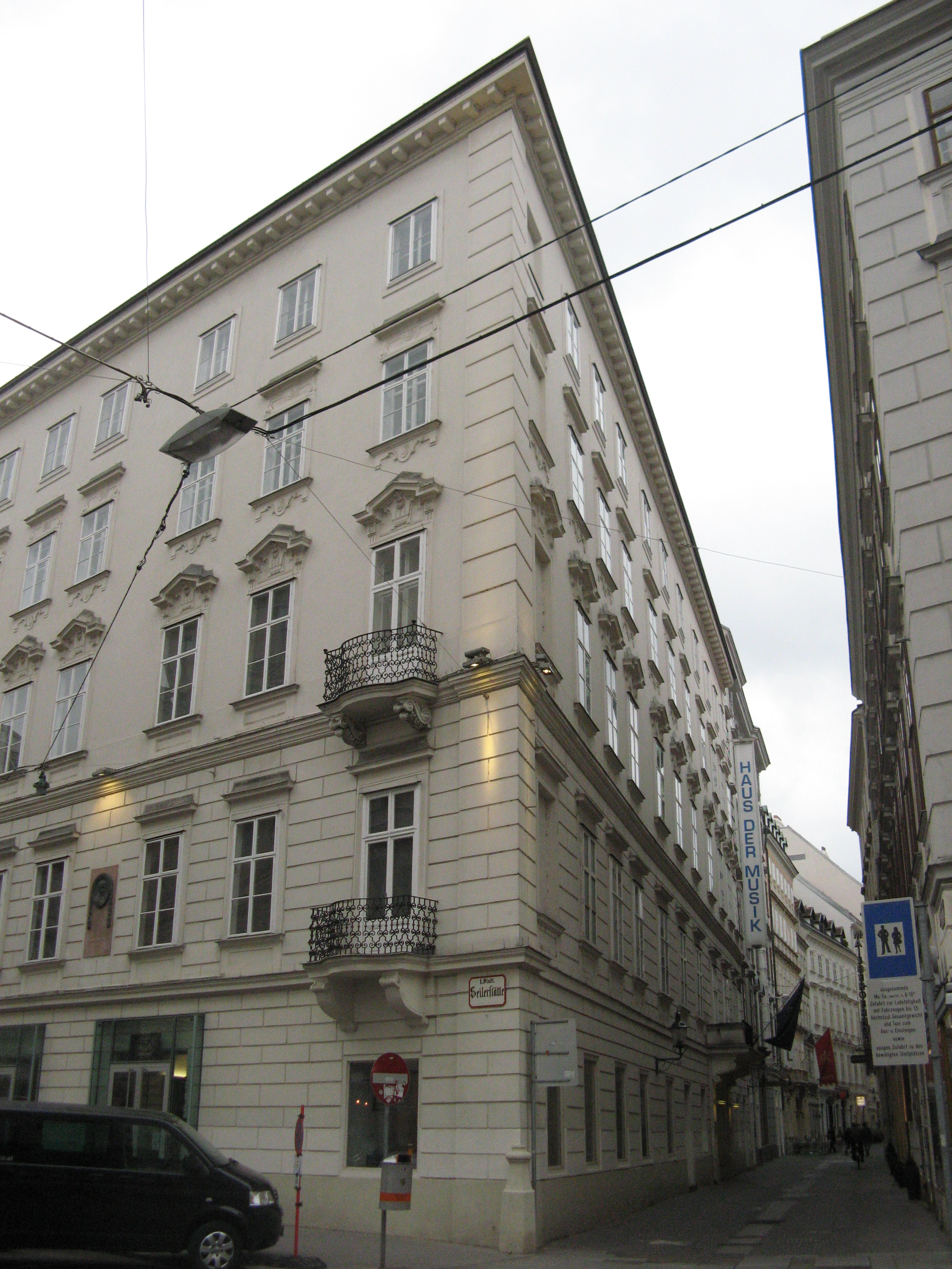 Haus der Musik, Annagasse 20, Wien-Innere Stadt